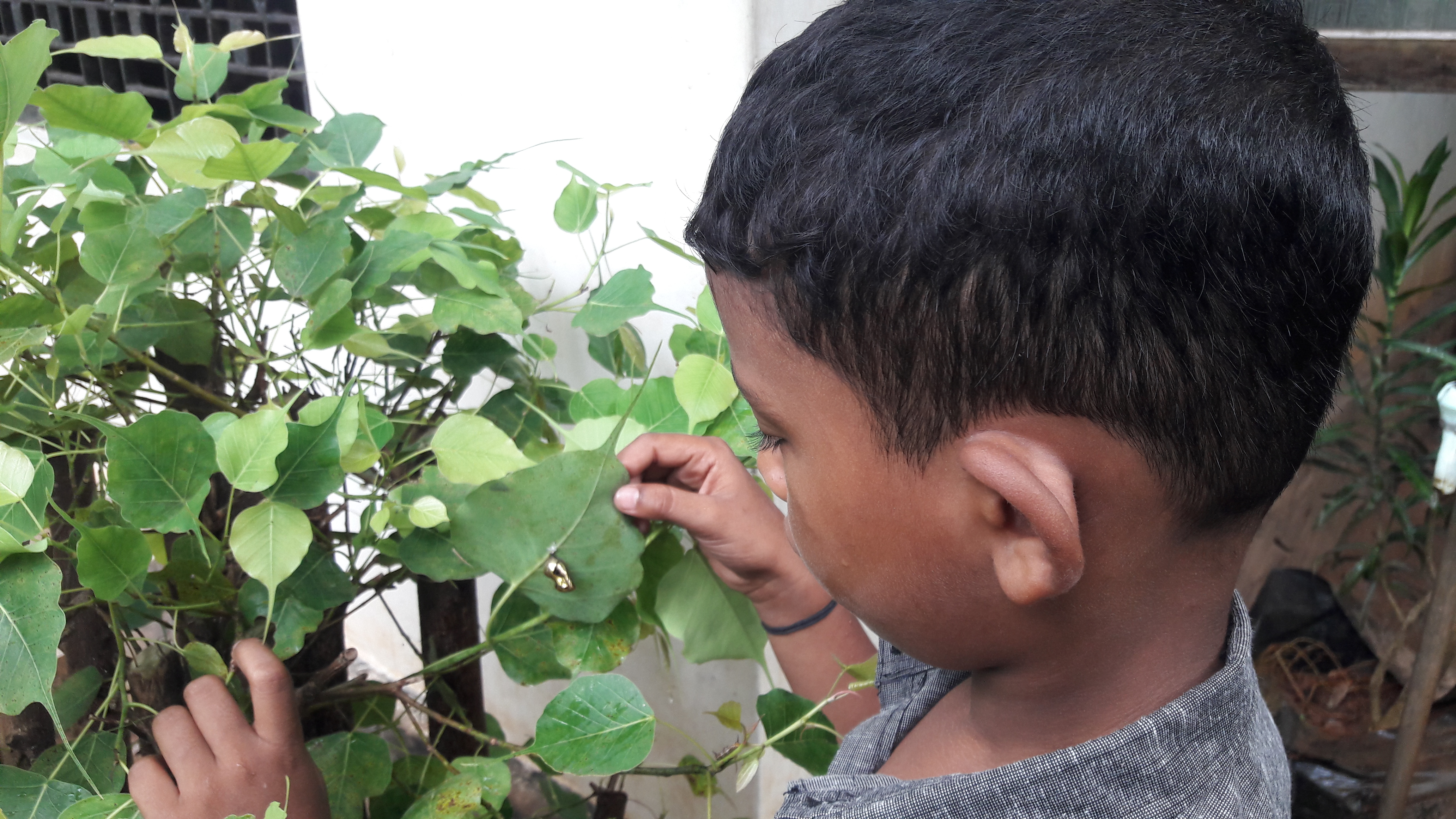 പ്ലാന്റ് വില്ലേജ് ചാരിറ്റബിൾ സൊസൈറ്റി എന്ന നേച്ചർ ക്ലബ് സംരക്ഷിച്ച് വരുന്ന അരയാൽ മരത്തിൽ ചിത്രശലഭത്തിന്റെ സമാധി (Pupa). അരയാൽ / Peepal tree ശാസ്ത്രീയ നാമം - Ficus religiosa കുടുംബം - Moraceae.